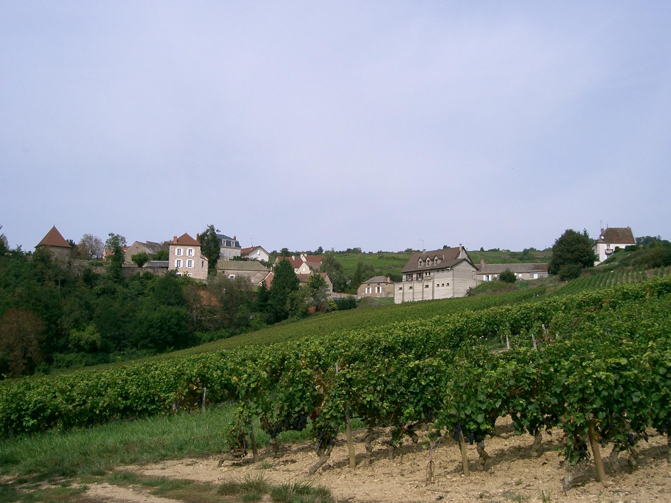 Dezize-lès-Maranges depuis la voie verte Santenay-Nolay